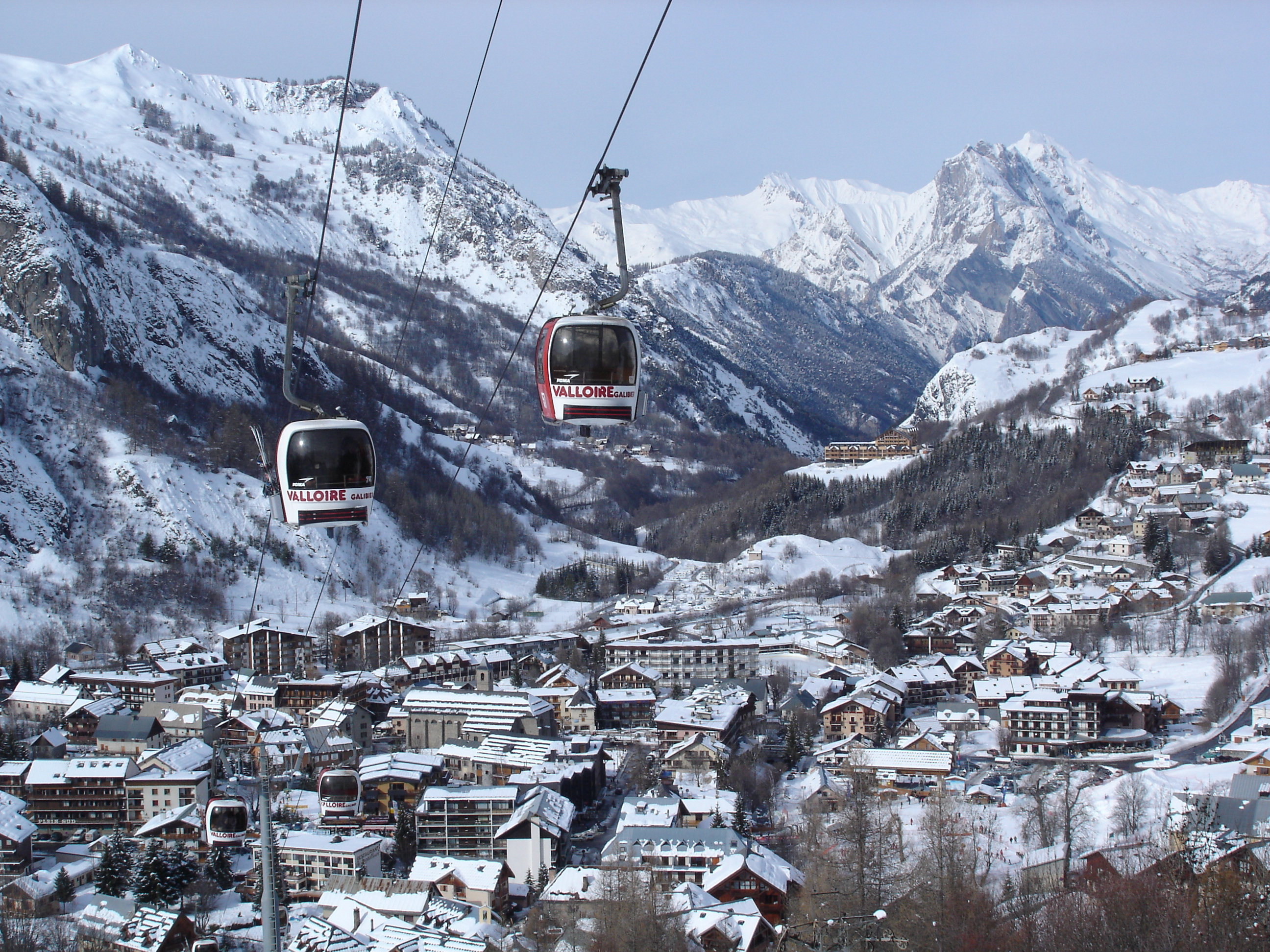 Valloire depuis les pistes de la Sétaz